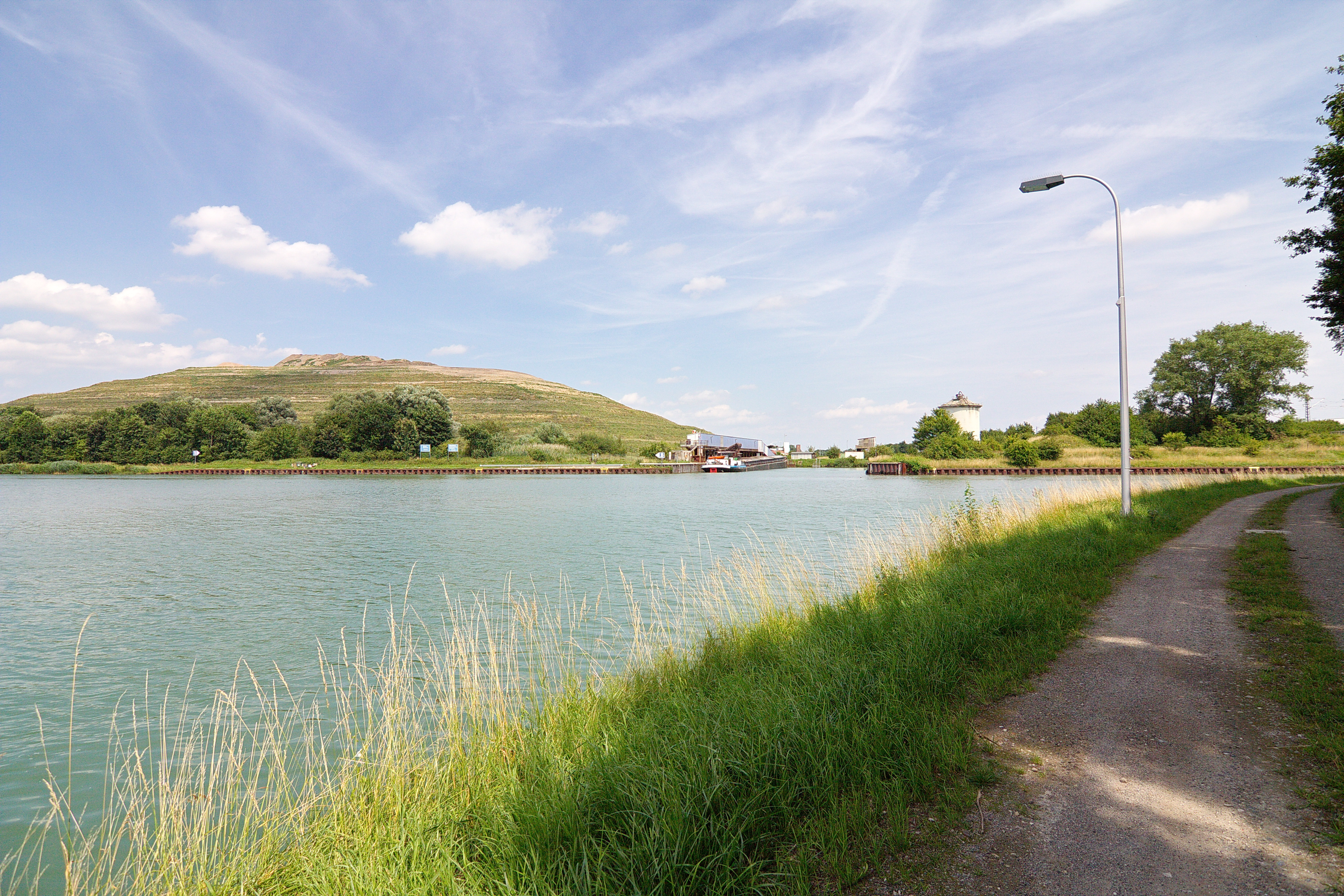 Mittellandkanal bei Bolzum (Sehnde), Niedersachsen, Deutschland